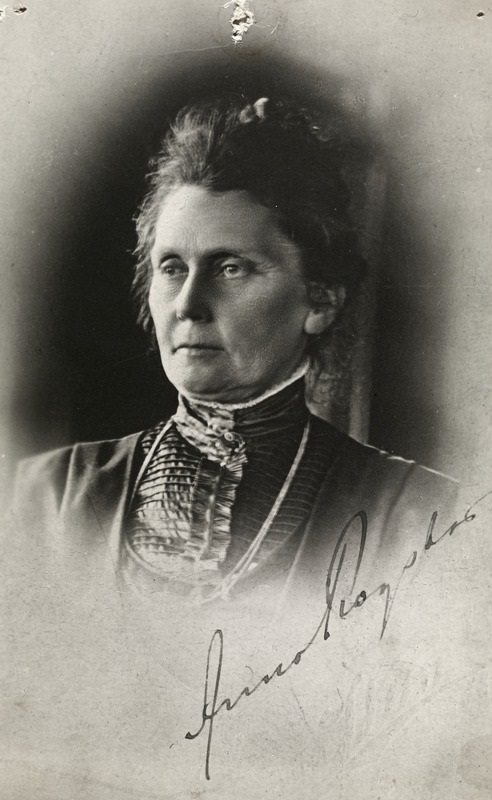 Portrett av Anna Rogstad (1854–1938), første kvinnelige stortingsrepresentant.